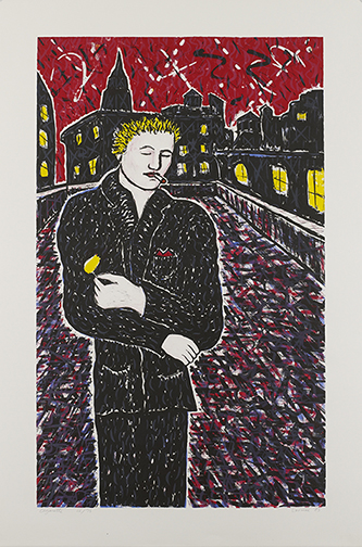 Lithographie (32" x 47"), 1985. Musée de Brooklyn, collection permanente.